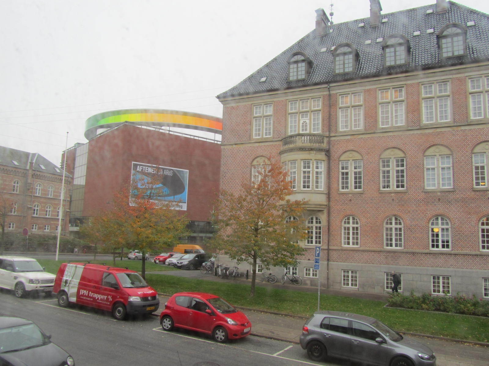 Fo-byen´i aknast paistab Arhus´i kohtumaka ja kunstimuuseum ARoS, a. 2011